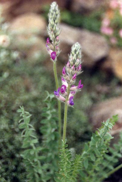 Oxytropis splendens